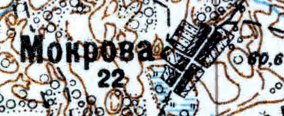 Топографическая карта Ленинградской области, квадрат VIc-28 (Луга), деревня Мокрово